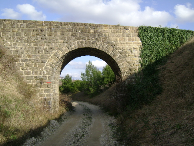 Mostić na trasi "Parenzane" nedaleko Grožnjana